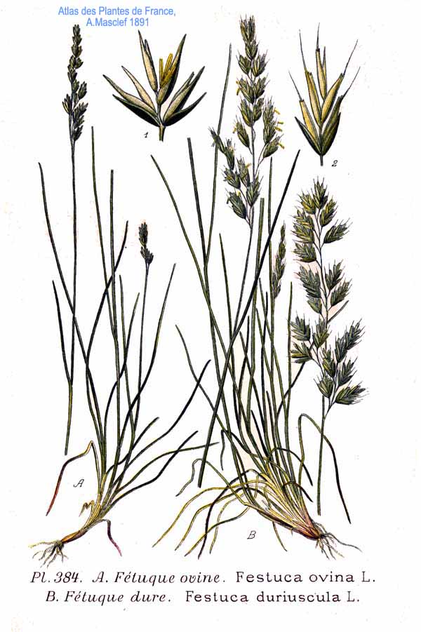 Festuca ovina L., Festuca duriuscula L.